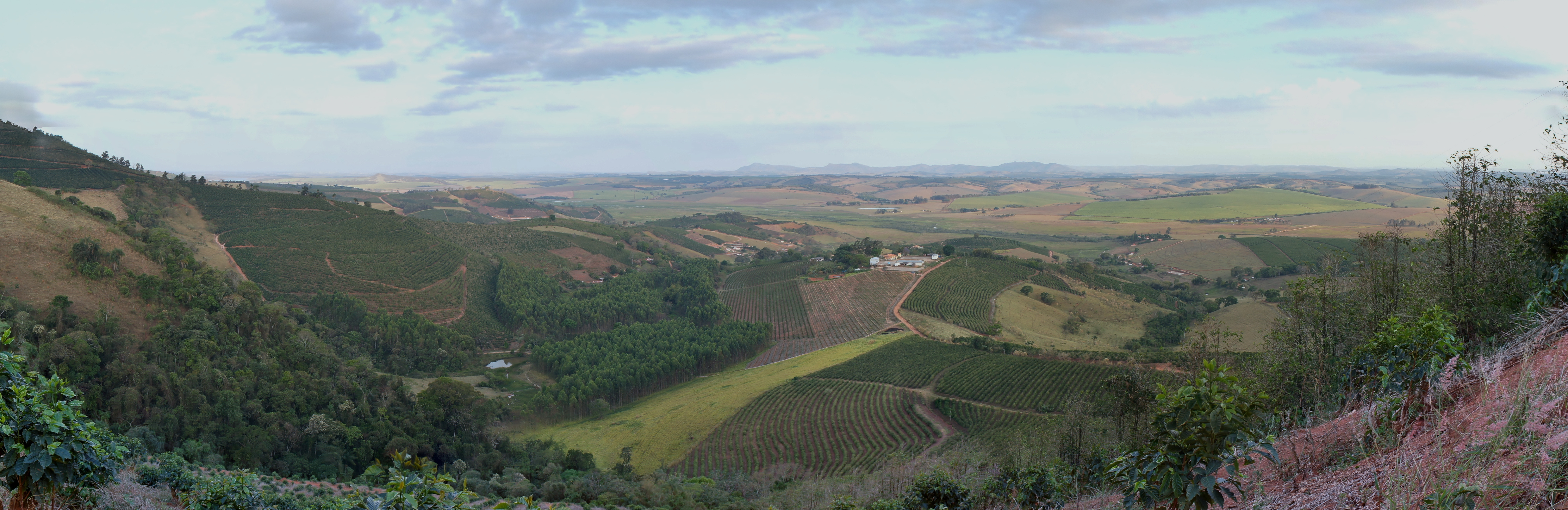 O Sul de Minas Gerais